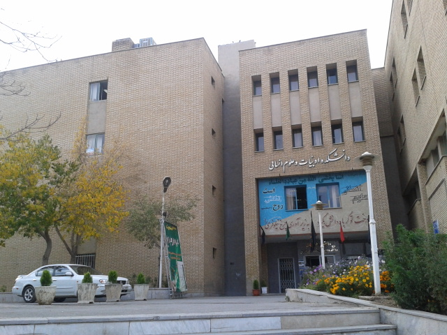 دانشکده ادبیات وعلوم انسانی